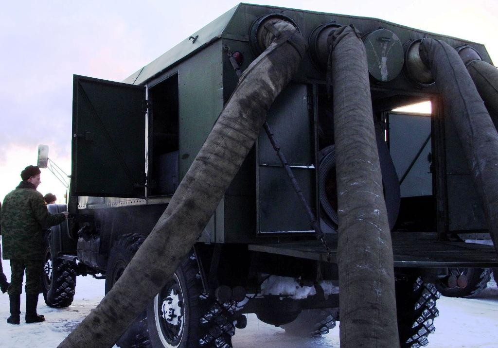 Моторный подогреватель УМП-350-131.